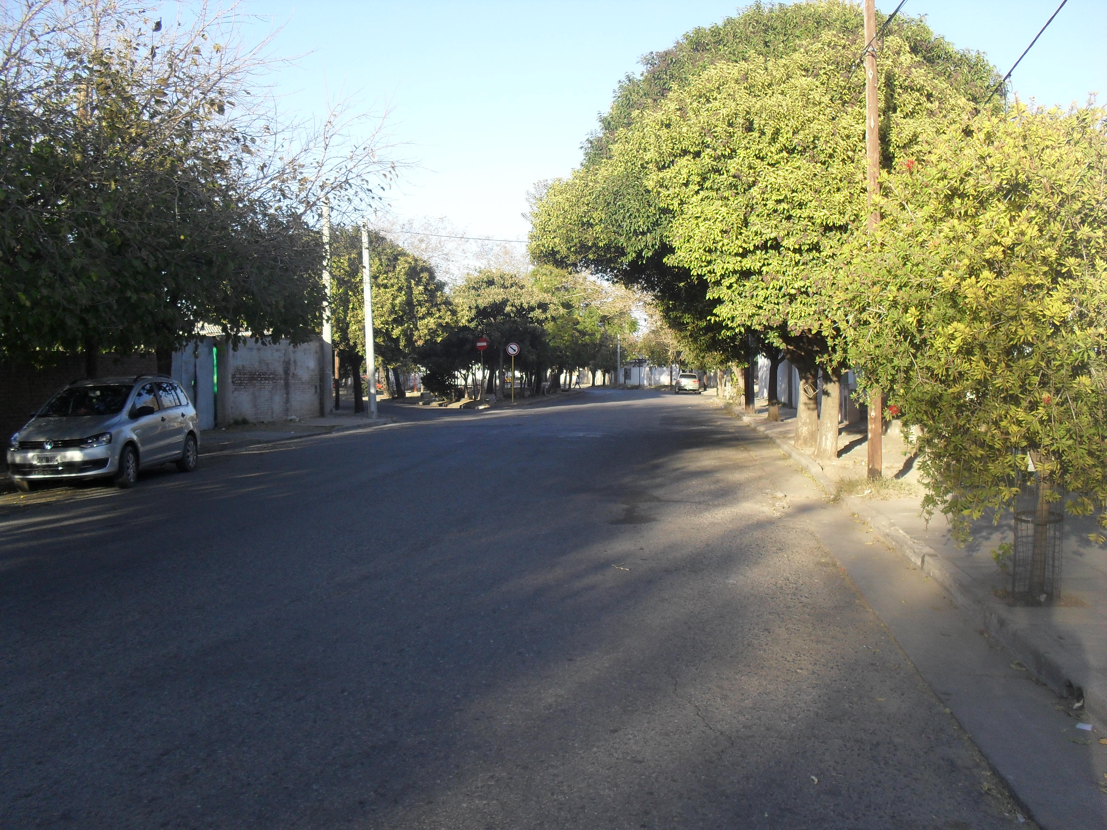 Vista de la calle Constantino Gaito desde la altura 1400. Barrio Primera Junta. Córdoba. Argentina.